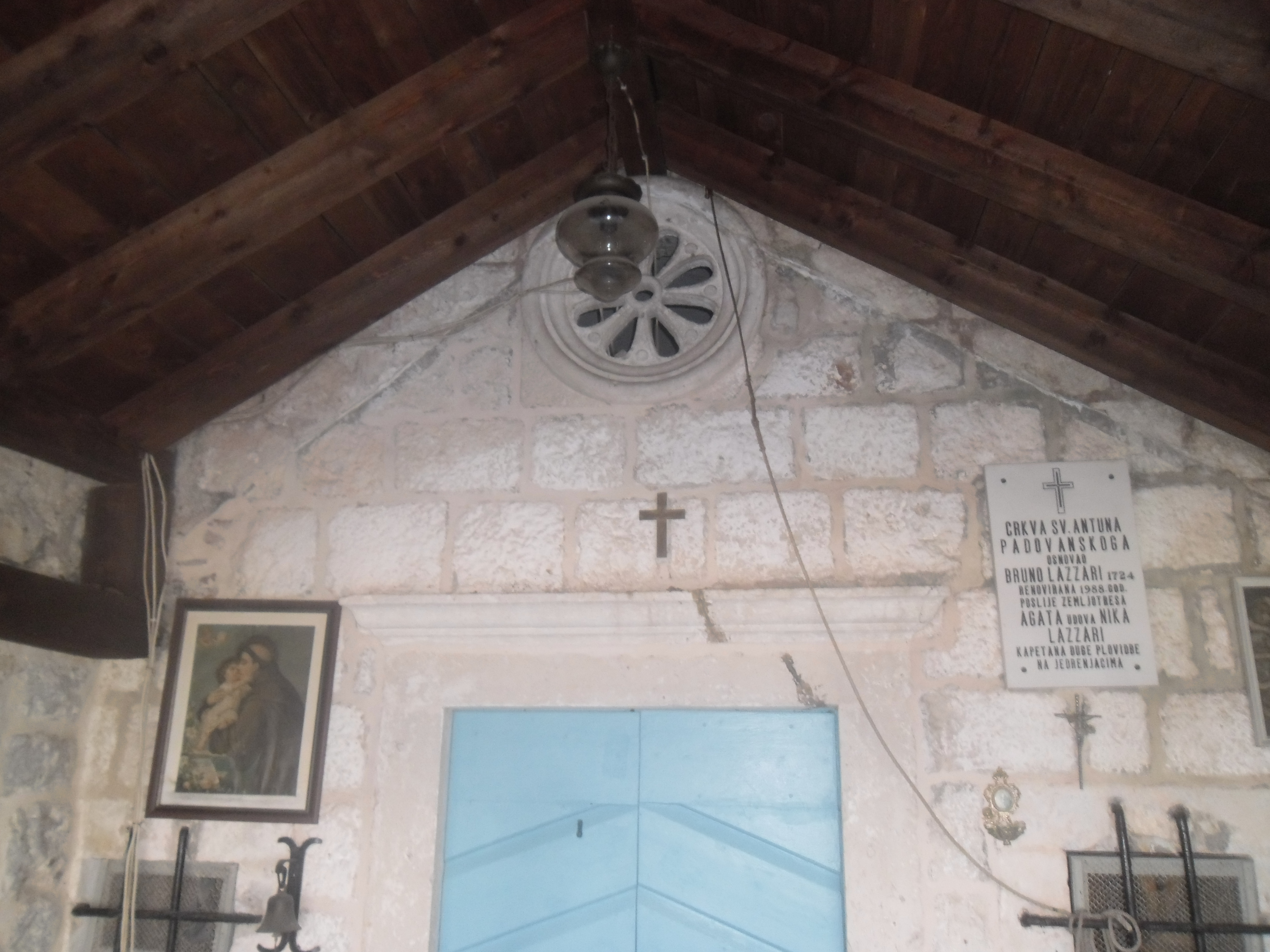 Bay of Kotor